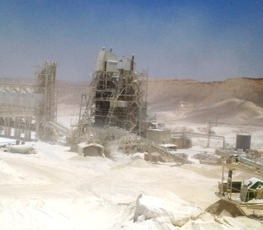 תנורים להפקת סיד מאבן גיר במישור רותם, נגב מינרלים תעשיתיים בע"מ